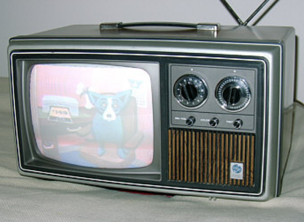 Foto de un viejo televisor analogico de la marca "Porta-Color", manufacturado por General Electric de EEUU.